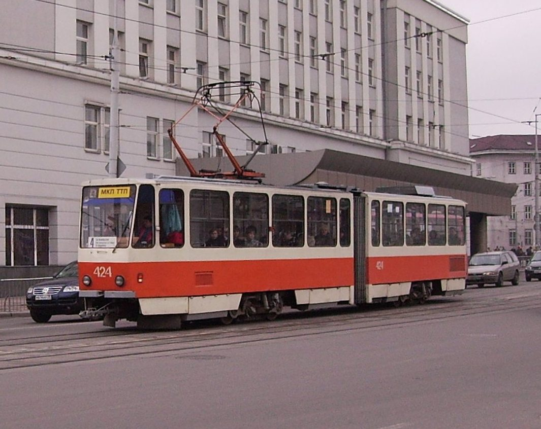 Tramwaj KT4 w Kaliningradzie.